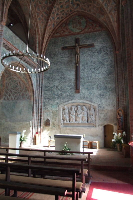 Auf der Burg Ziesar in Ziesar: Burgkapelle Innenansicht